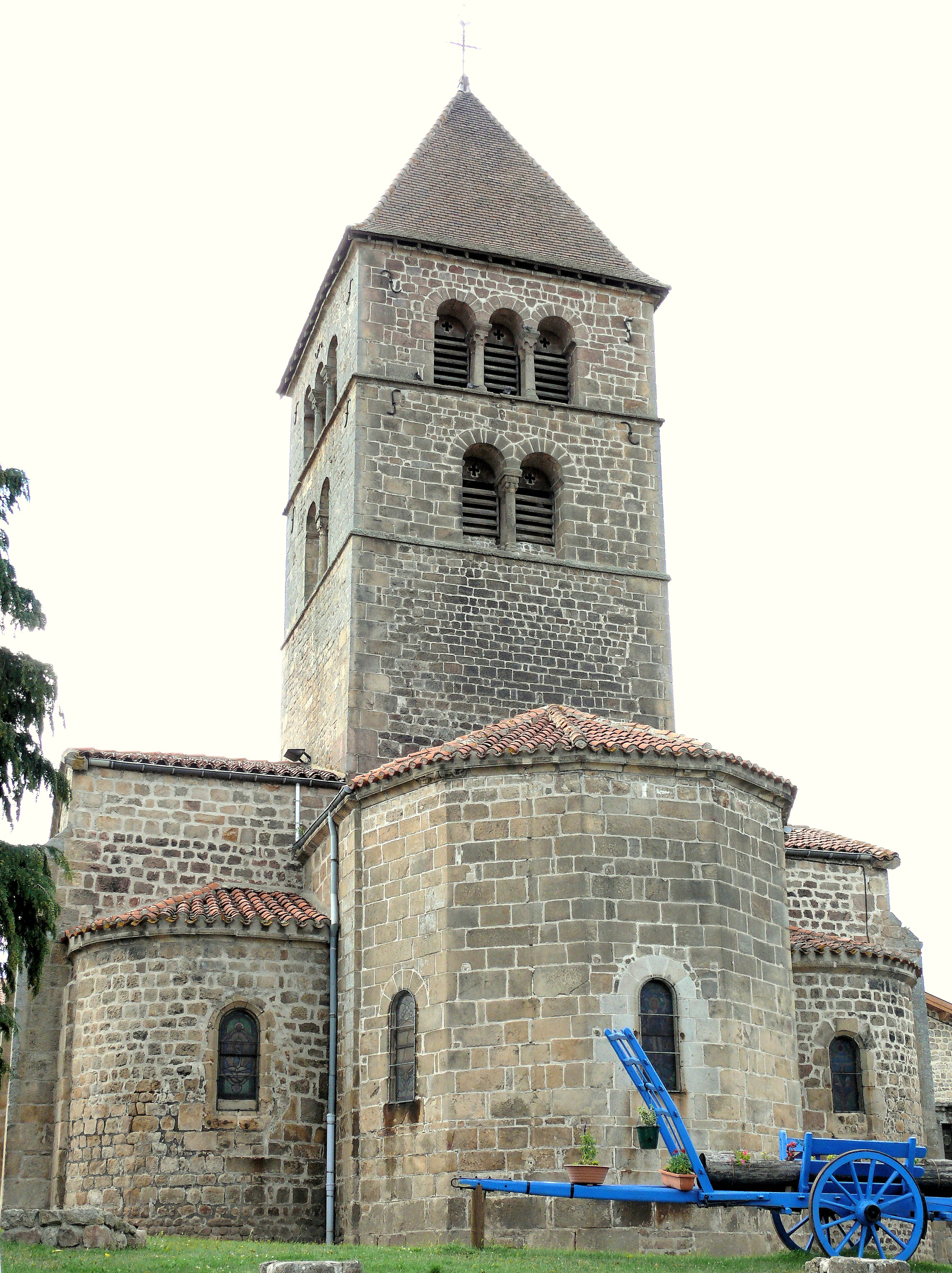 Rozier-Côtes-d'Aurec - Eglise Saint-Blaise - Chevet